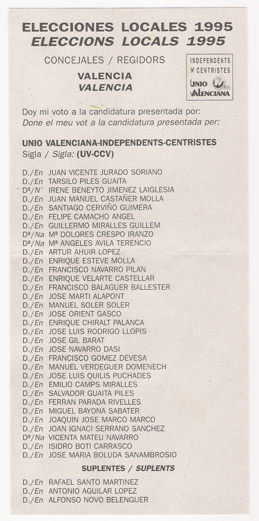 Papeleta de la lista Unio Valenciana - Independents Centristes, para las elecciones municipales de 1995 en el municipio de Valencia